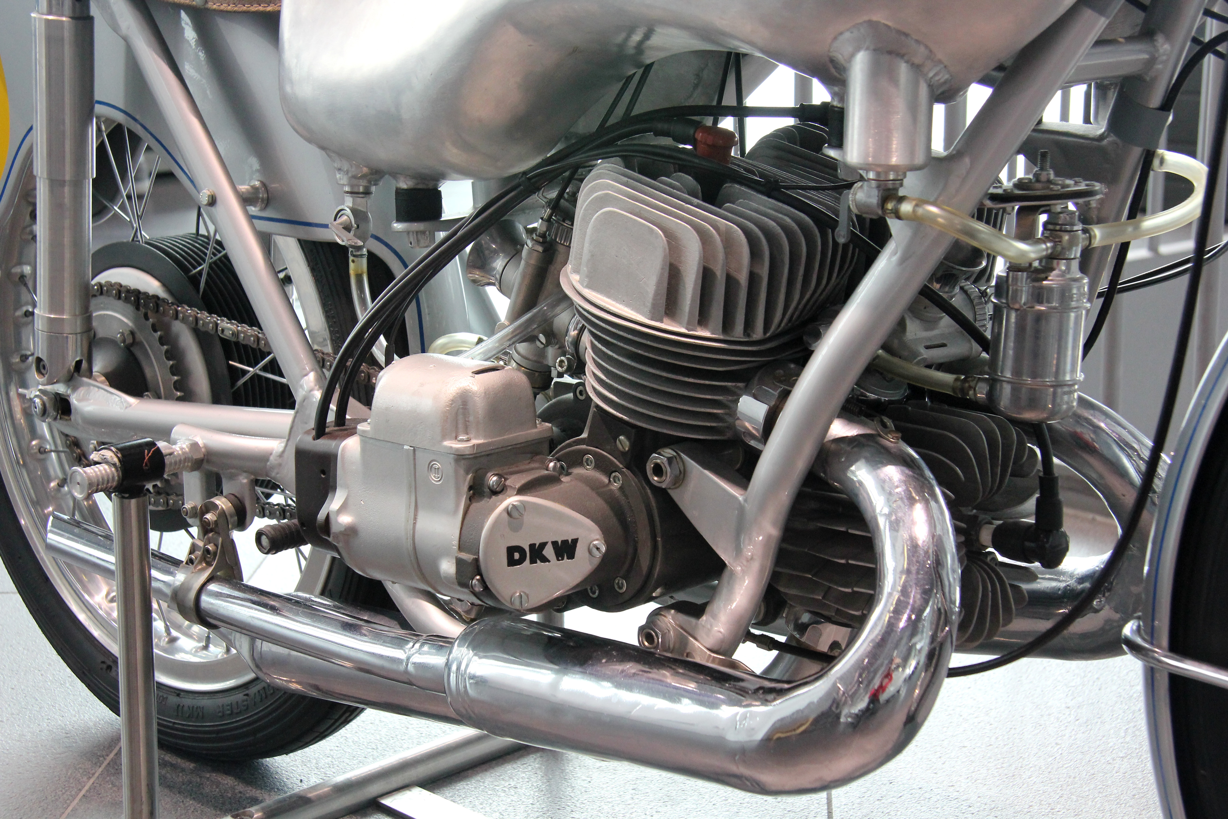 DKW RM 350, Baujahr 1953, im museum mobile in Ingolstadt. 3-Zylinder-Zweitaktmotor, 350 cm³, 38 PS bei 12.000/min, Höchstgeschwindigkeit 190 km/h. Im Einsatz von 1952 bis 1956. Bekannt als „Singende Säge“